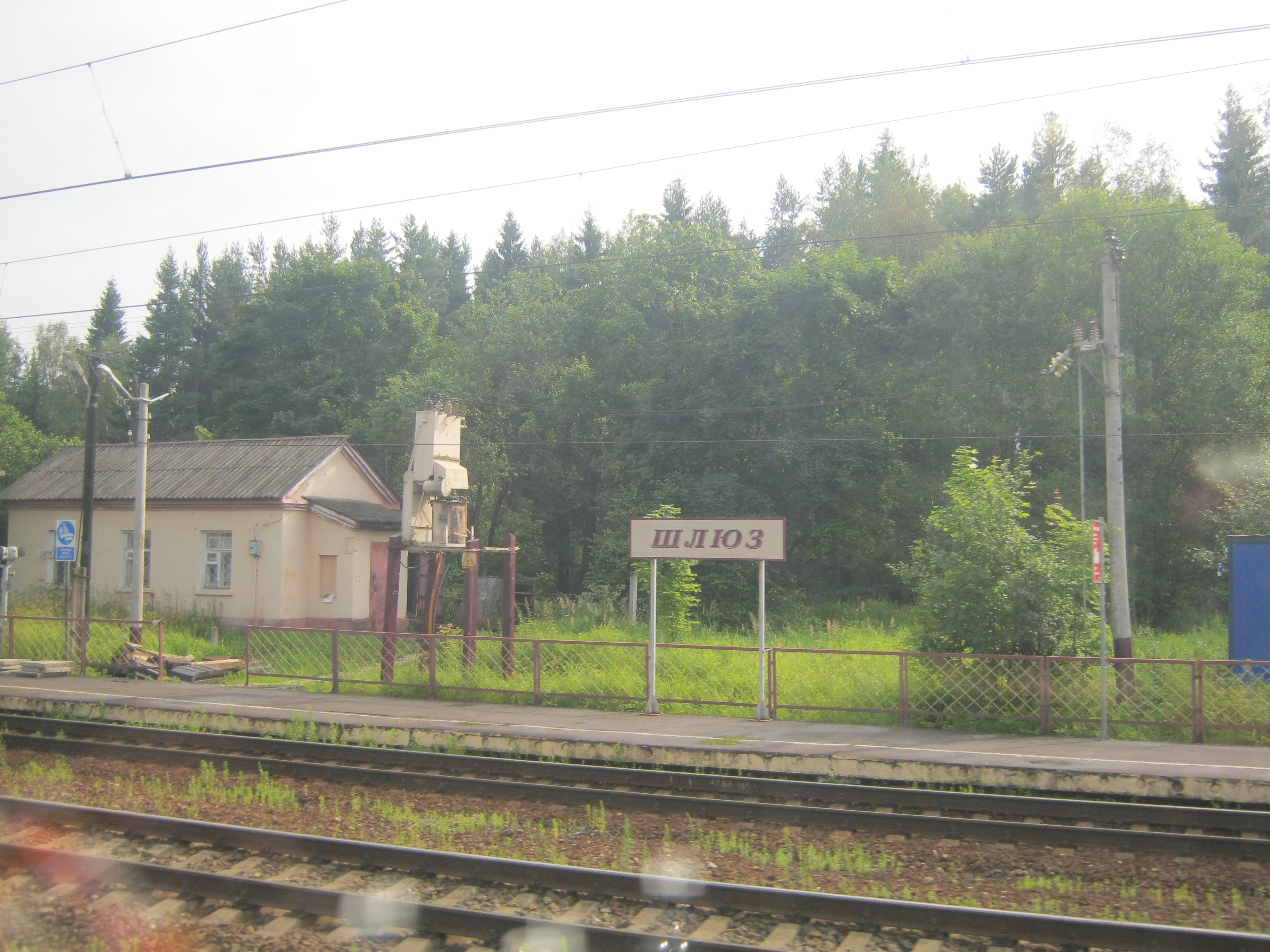 Фотография сделана из окна поезда Санкт-Петербург-Москва